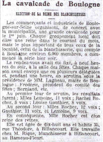 Annonce de l'élection de la reine des 6000 blanchisseuses de Boulogne-sur-Seine (aujourd'hui Boulogne-Billancourt, banlieue de Paris).